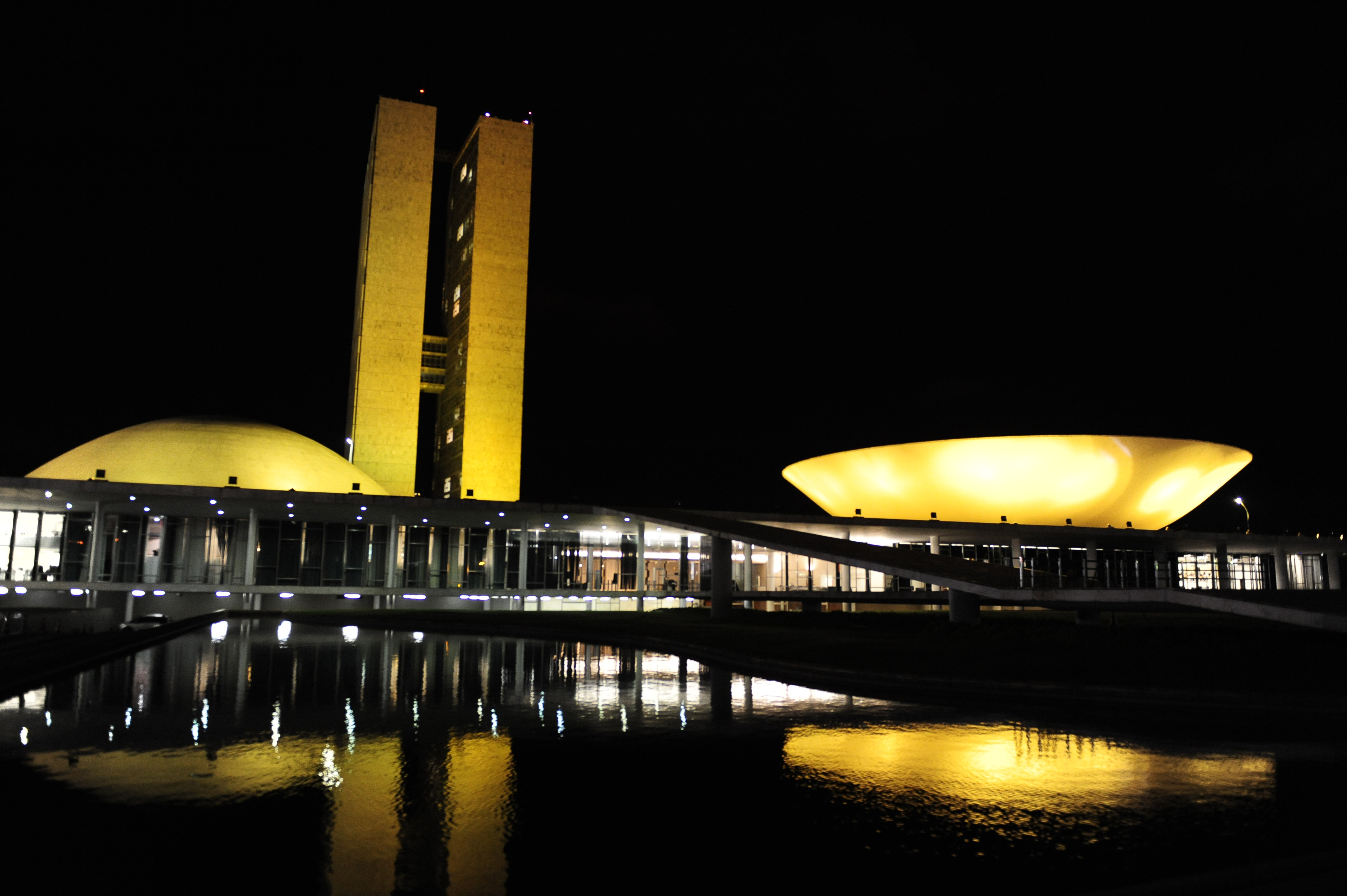 A cúpula do Senado está iluminada de amarelo até sexta-feira em apoio à campanha mundial Setembro Amarelo, de prevenção ao suicídio. Foto: Jonas Pereira/Agência Senado